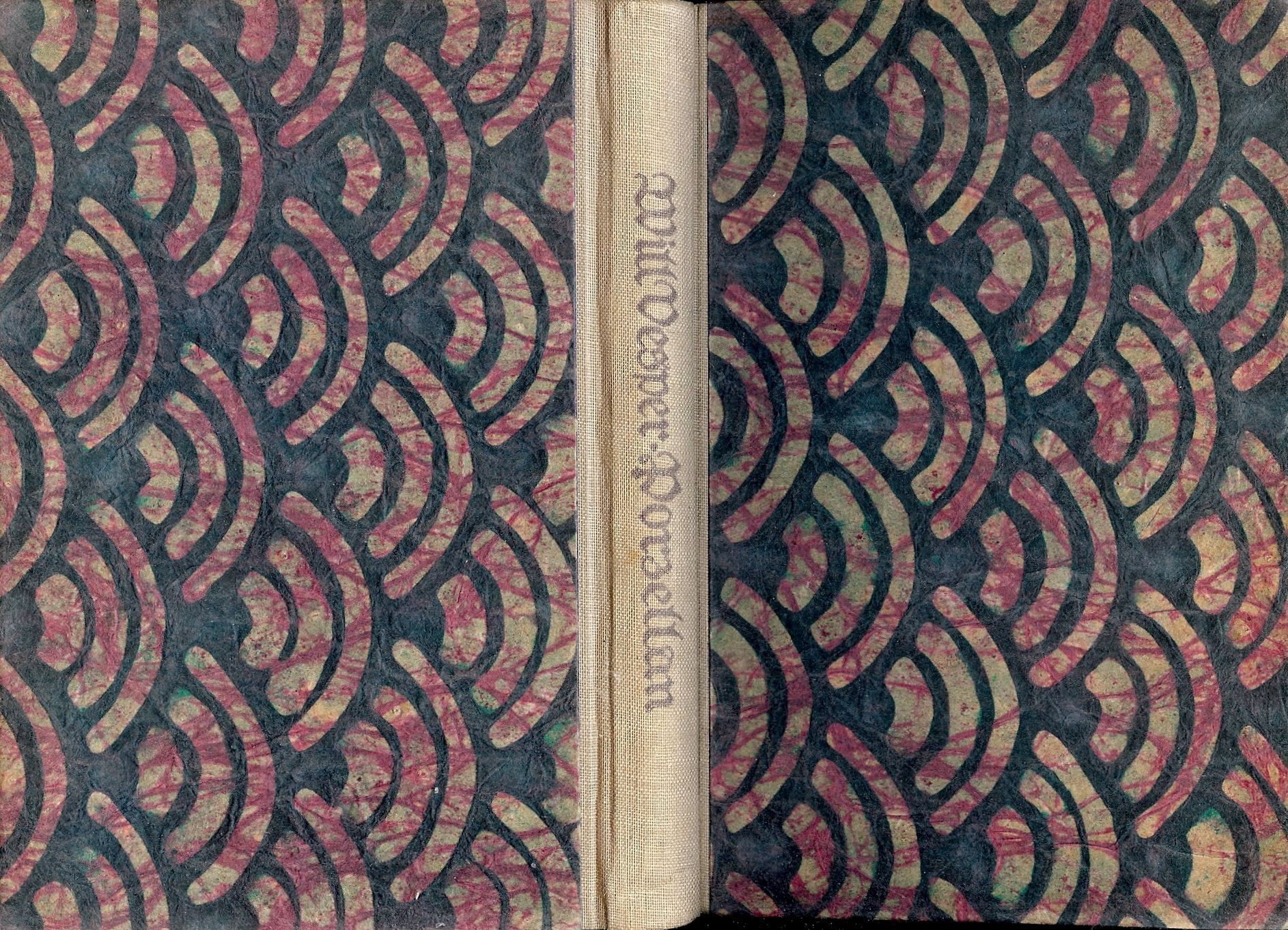 Bucheinband von Käte Vesper-Waentig, geboren 1879, selbst eingescannt